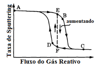 Adaptada de SMITH, Donald L. (22 de março de 1995). Thin-Film Deposition - Principles and Practice. [S.l.]: McGraw-Hill Education. 616 páginas.